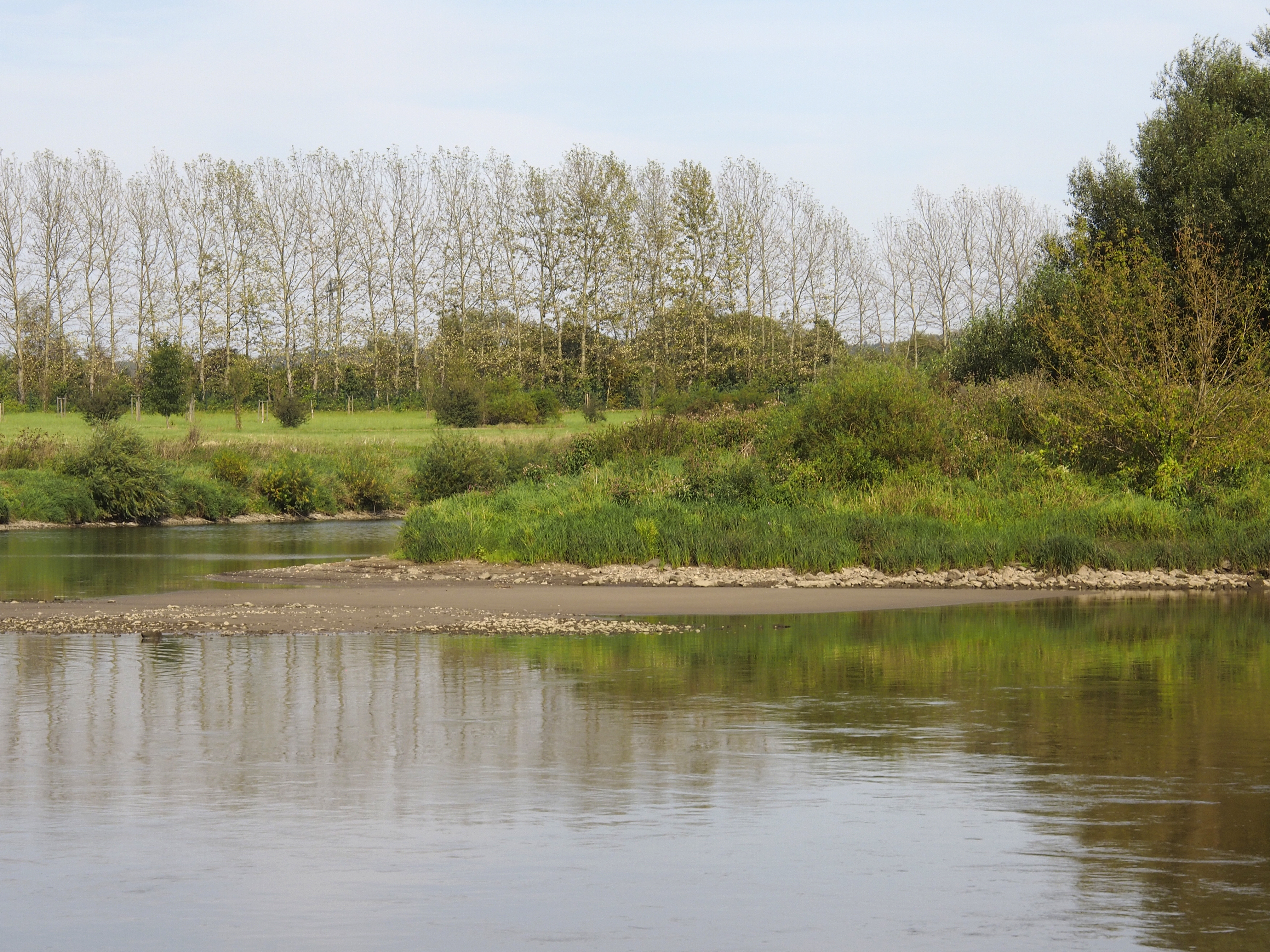 Gauernitzer Elbinsel - Ende Richtung Meißen